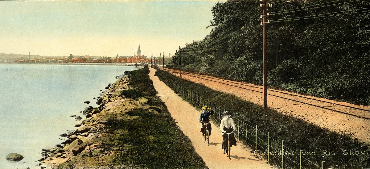 Cykelstien langs Østbanen, Postkort, ca 1904